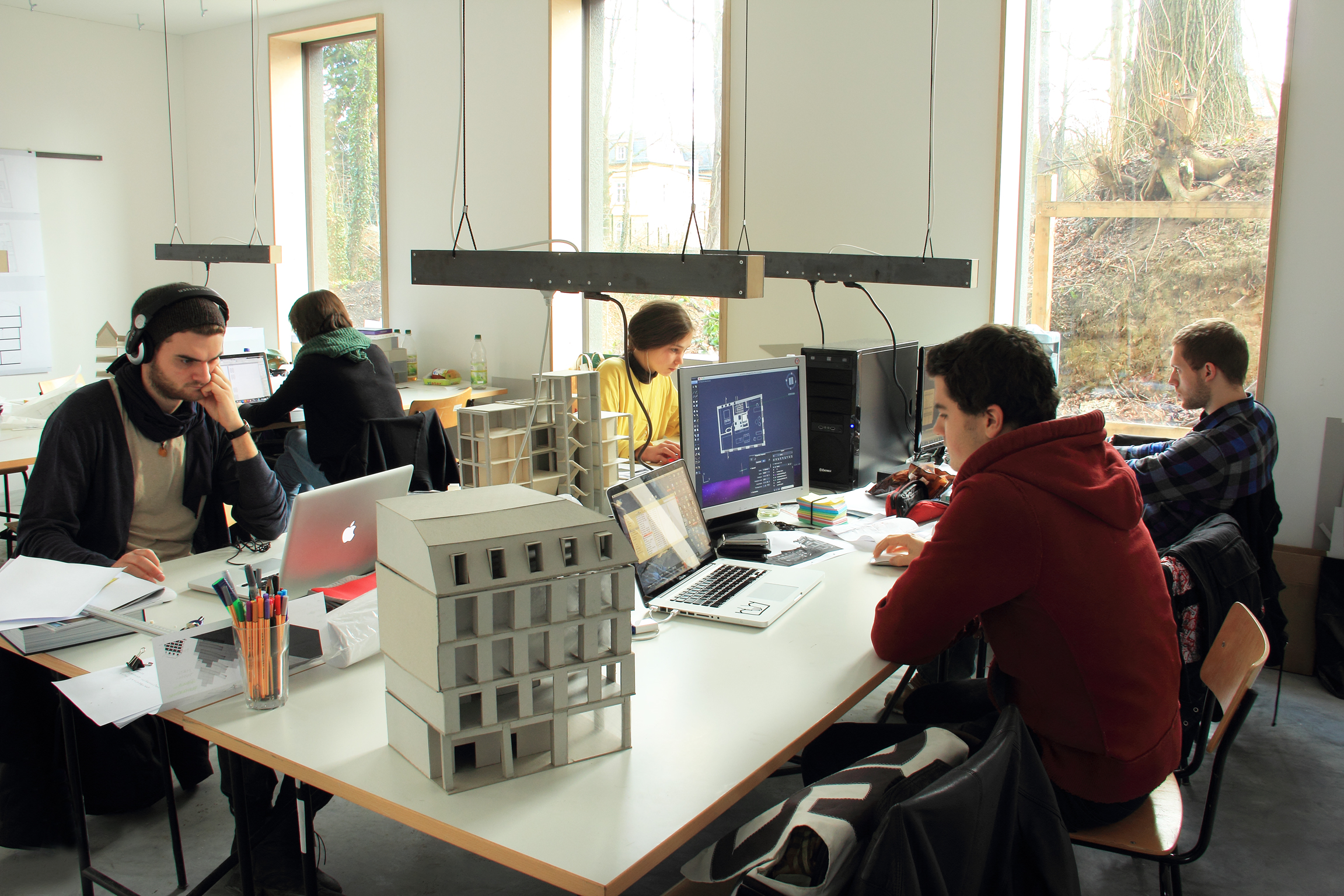 Arbeitsraum der Studenten